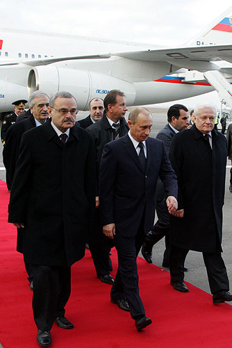 Визит в Азербайджан. Открытие Года России в Азербайджане